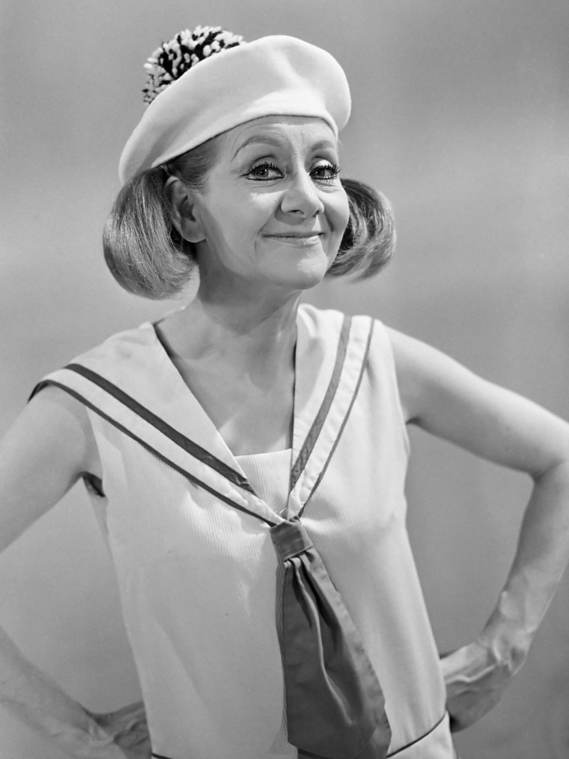 Conny Stuart als matroos 24 november 1966